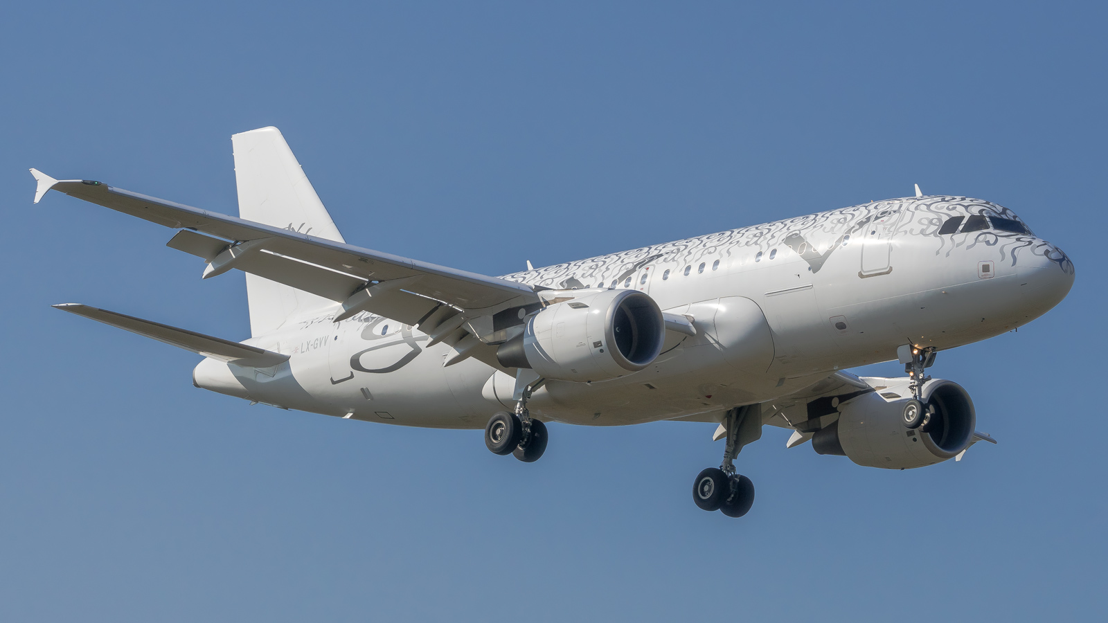 LX-GVV-A319CJ-Global-Jet-Luxembourg-VKO